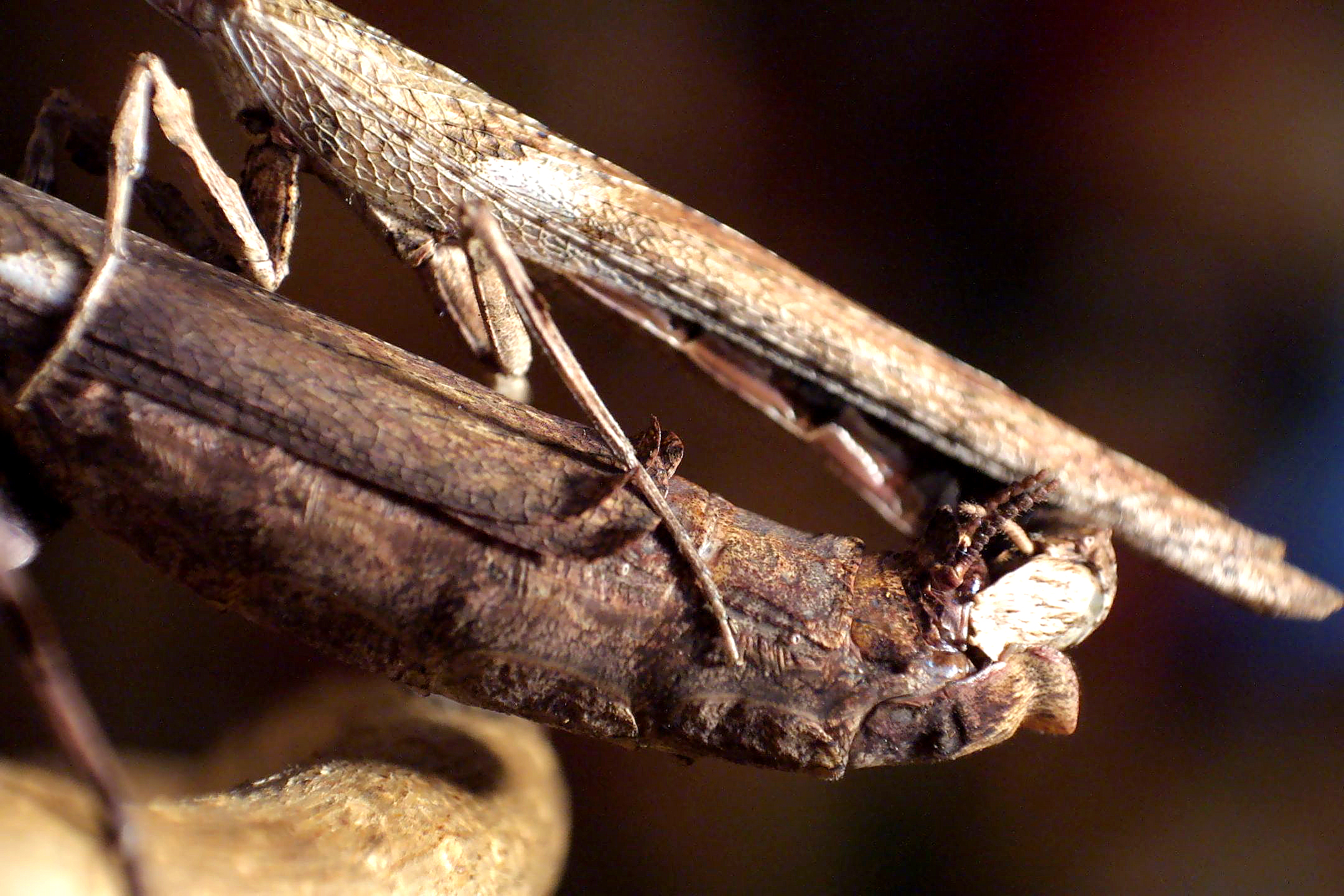 Popa spurca Paar bei der Kopulation